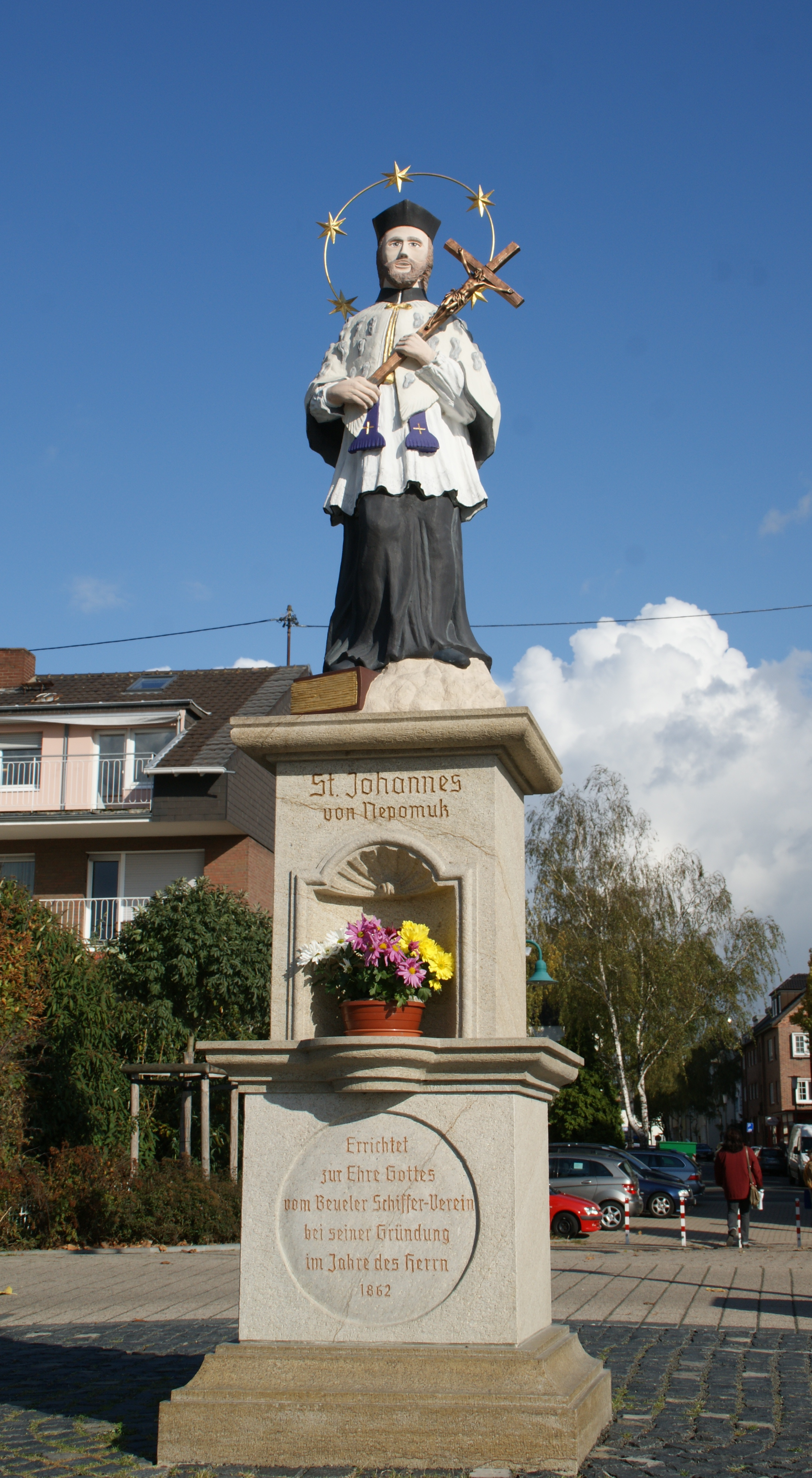 Statue von Johannes von Nepomuk, Beuel